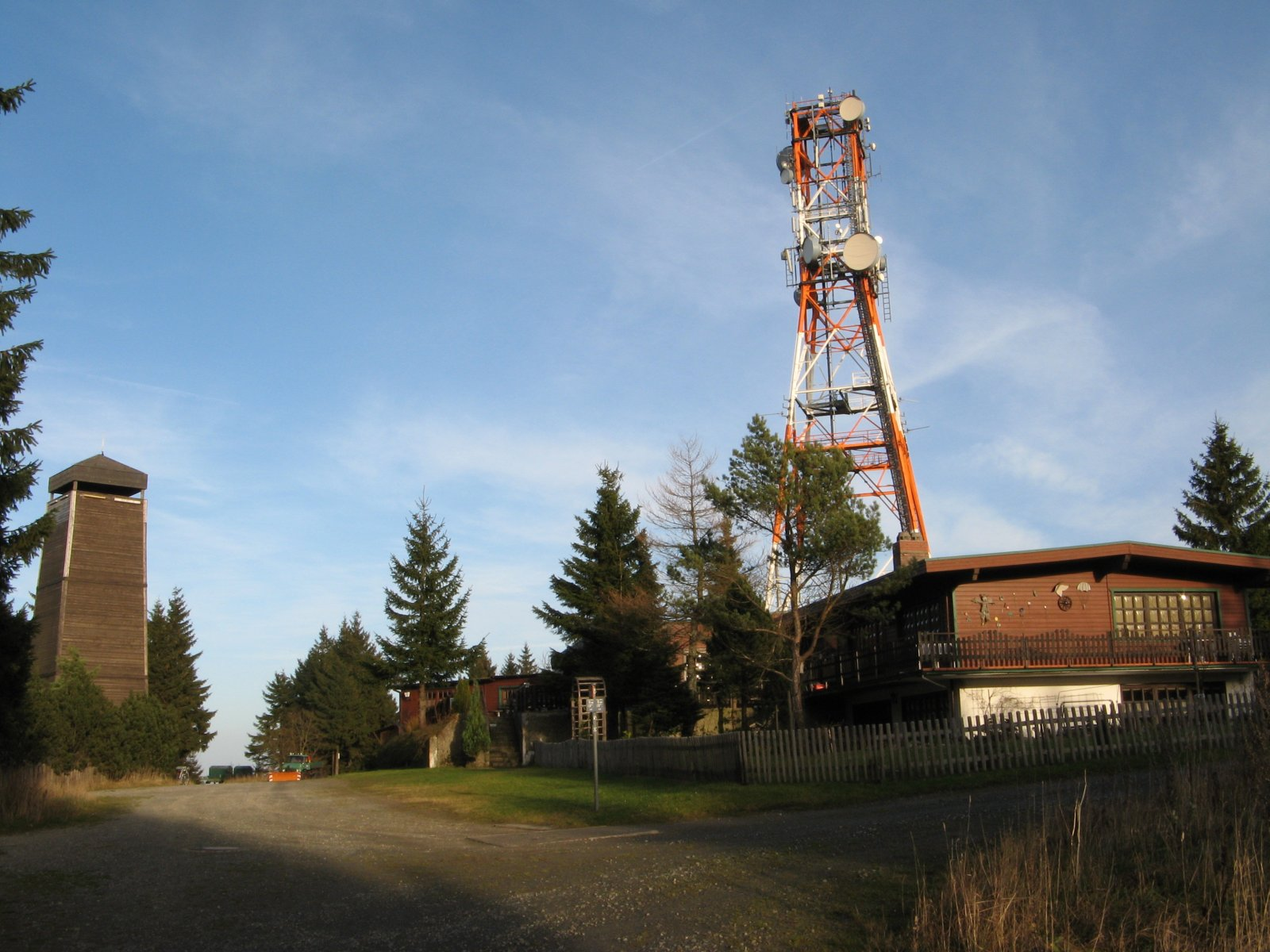 Gipfelgebäude auf dem Bocksberg